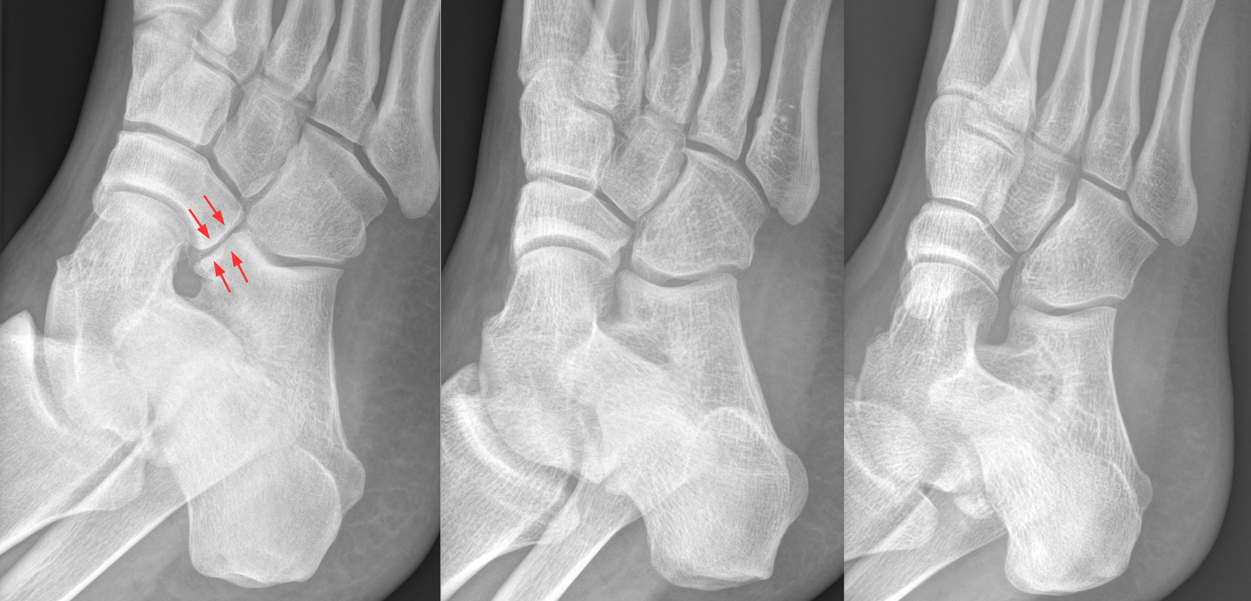 Häufigste Form der tarsalen Koalition, die kalkaneonavikulare Koalition im schrägen Röntgenbild des Fußes (links, Pfeile) mit zwei diesbezüglich unauffälligen Vergleichsfüßen. Die Koalition ist nicht knöchern, sondern fibrös oder kartilaginär. Man hat in dieser Aufnahme fast den Eindruck, es handele sich um eine Art Gelenk.